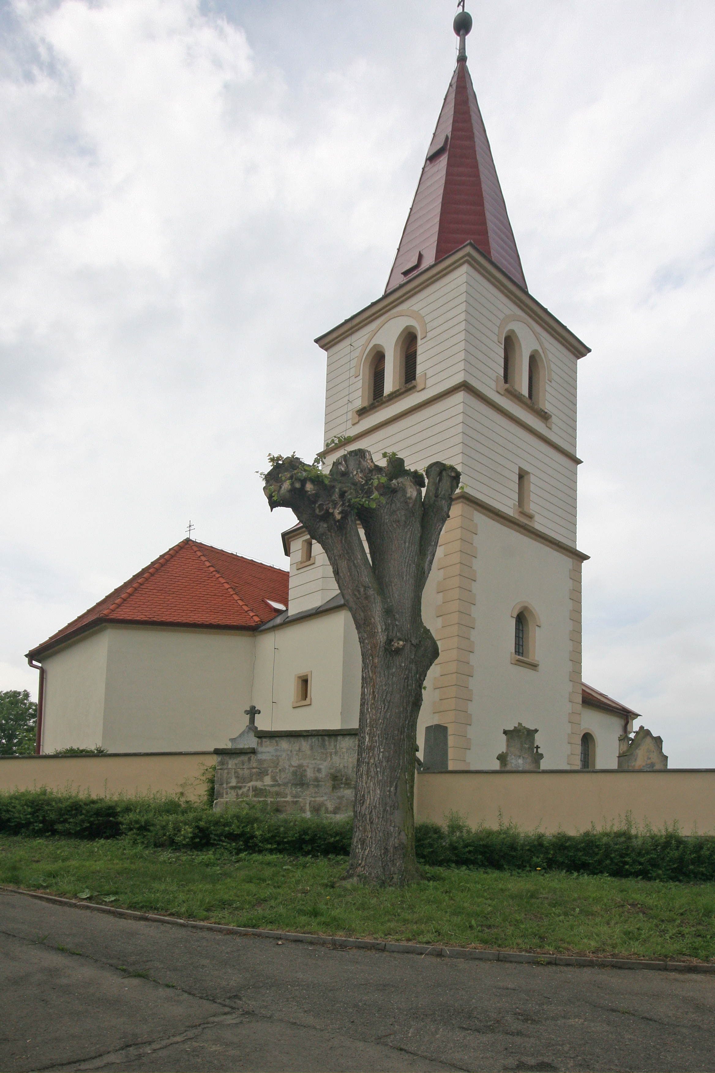 Kostel sv. Petra a Pavla (Rozhovice), Rozhovice